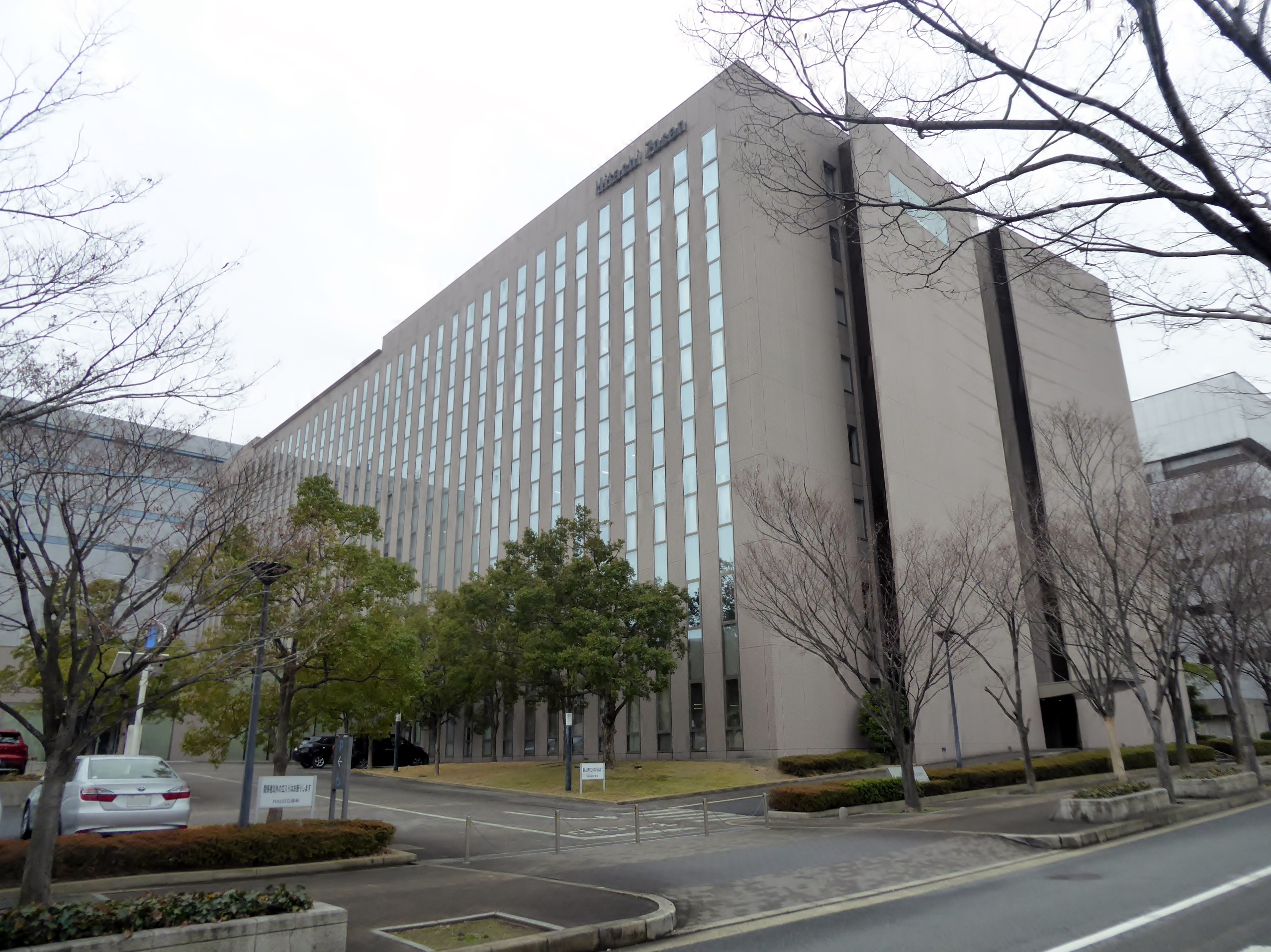 日立造船株式会社本社を撮影。 Panasonic Lumix DMC-TZ60